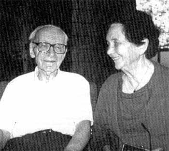 Dr. Lucy Ackerknecht mit Dr. Kurt Adler auf dem Internationalen Kongress der Individualpsychologie 1993 in Budapest, Ungarn.